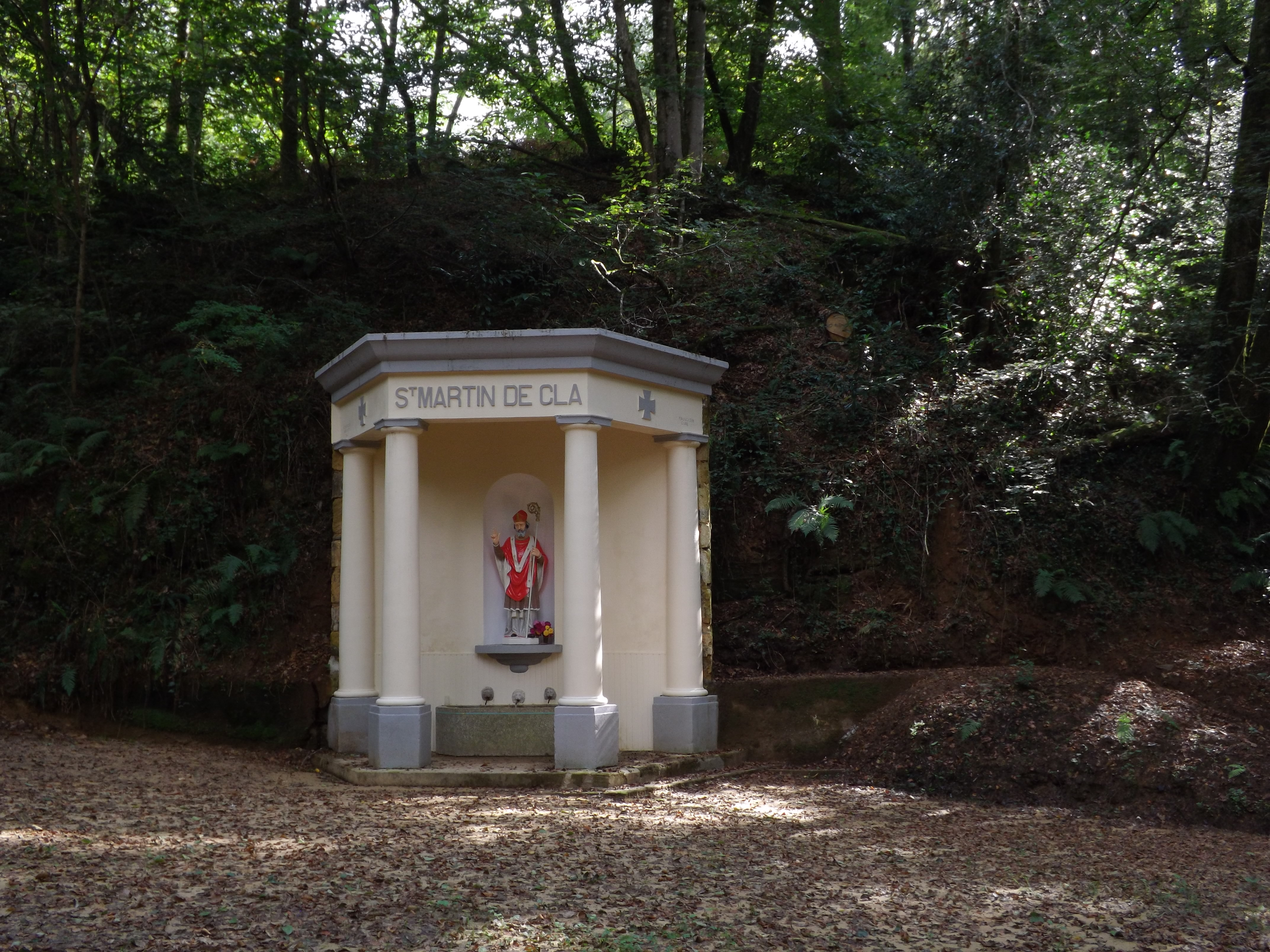 Hont de sent Martin de Clar, Momui, Shalòssa, Gasconha